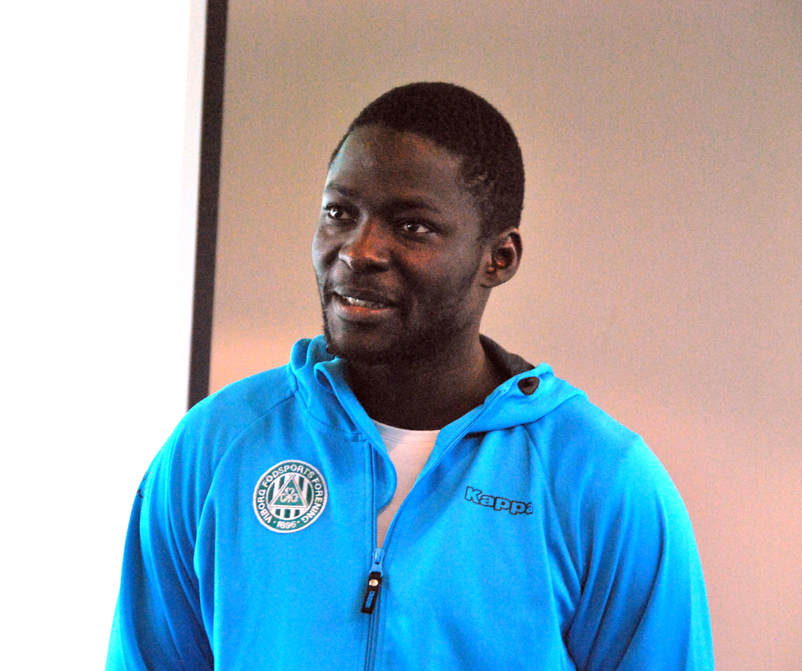 Fodboldspilleren Ousmane Sarr fra Viborg FF. Her ved præsentation af spillertruppen for foråret 2012.